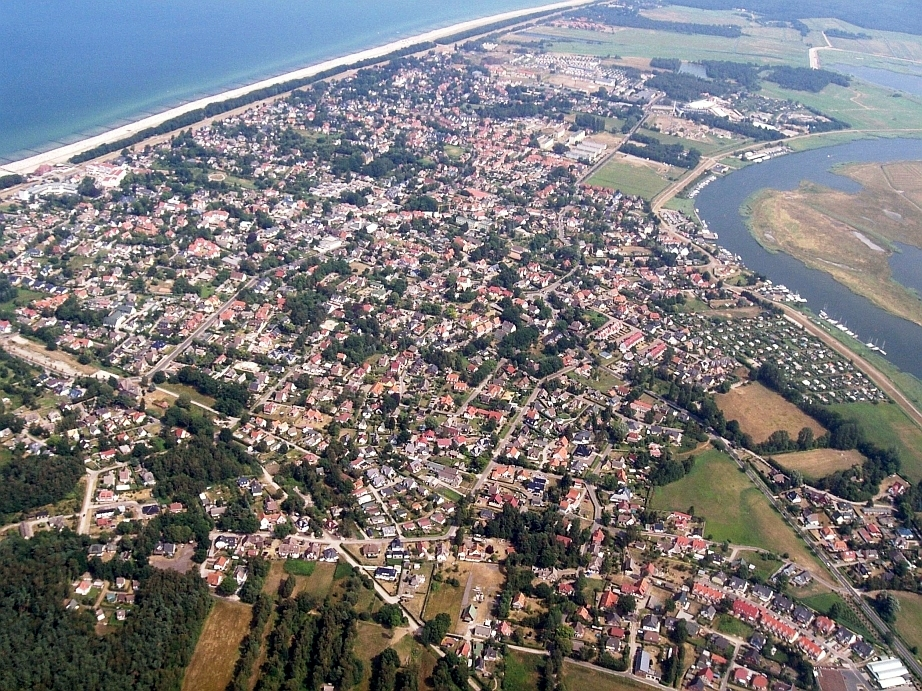 Luftbildaufnahme von Zingst (Höhe 600 m)